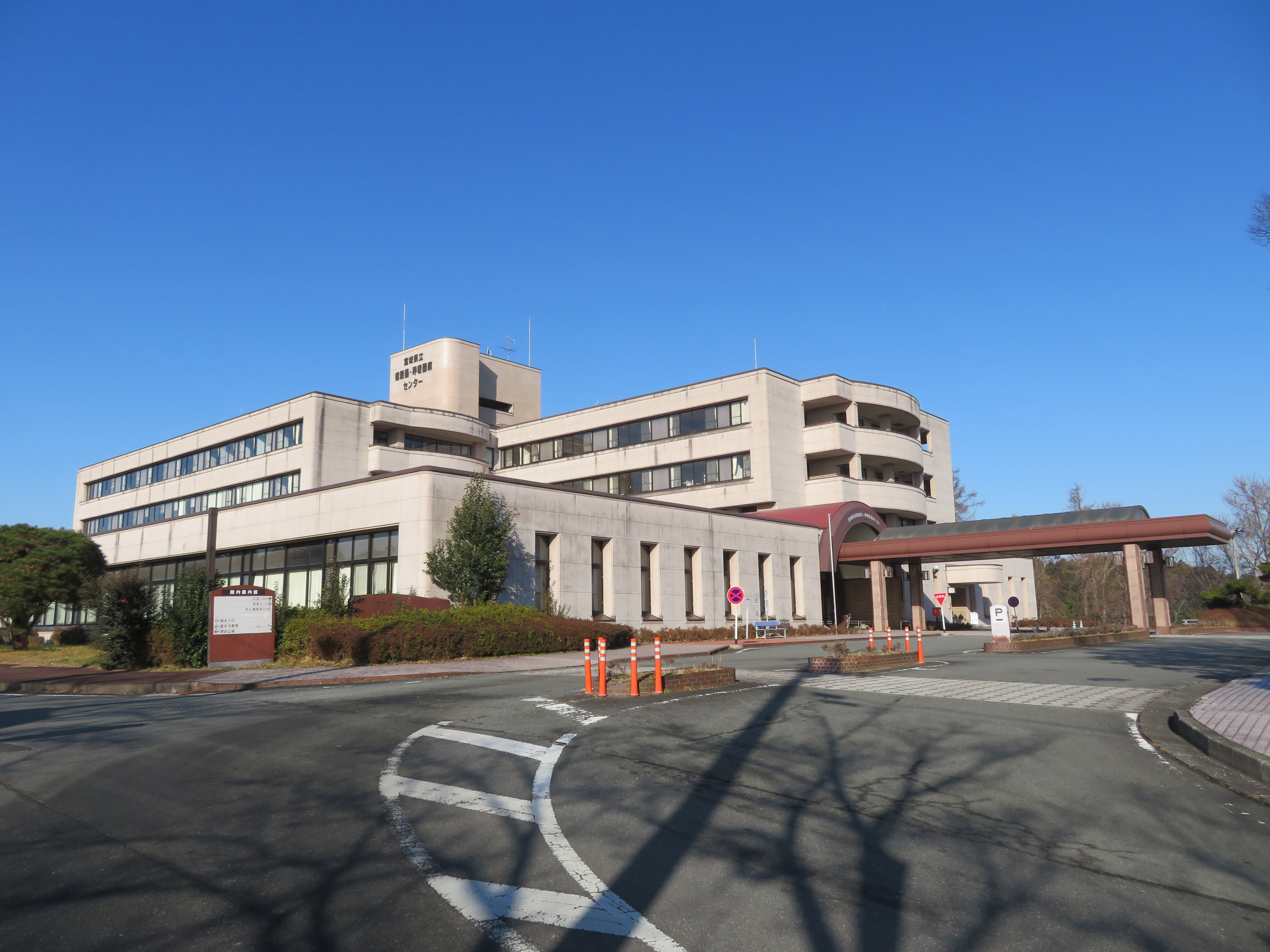 宮城県栗原市に所在する宮城県立循環器・呼吸器病センター Canon PowerShot SX720 HS